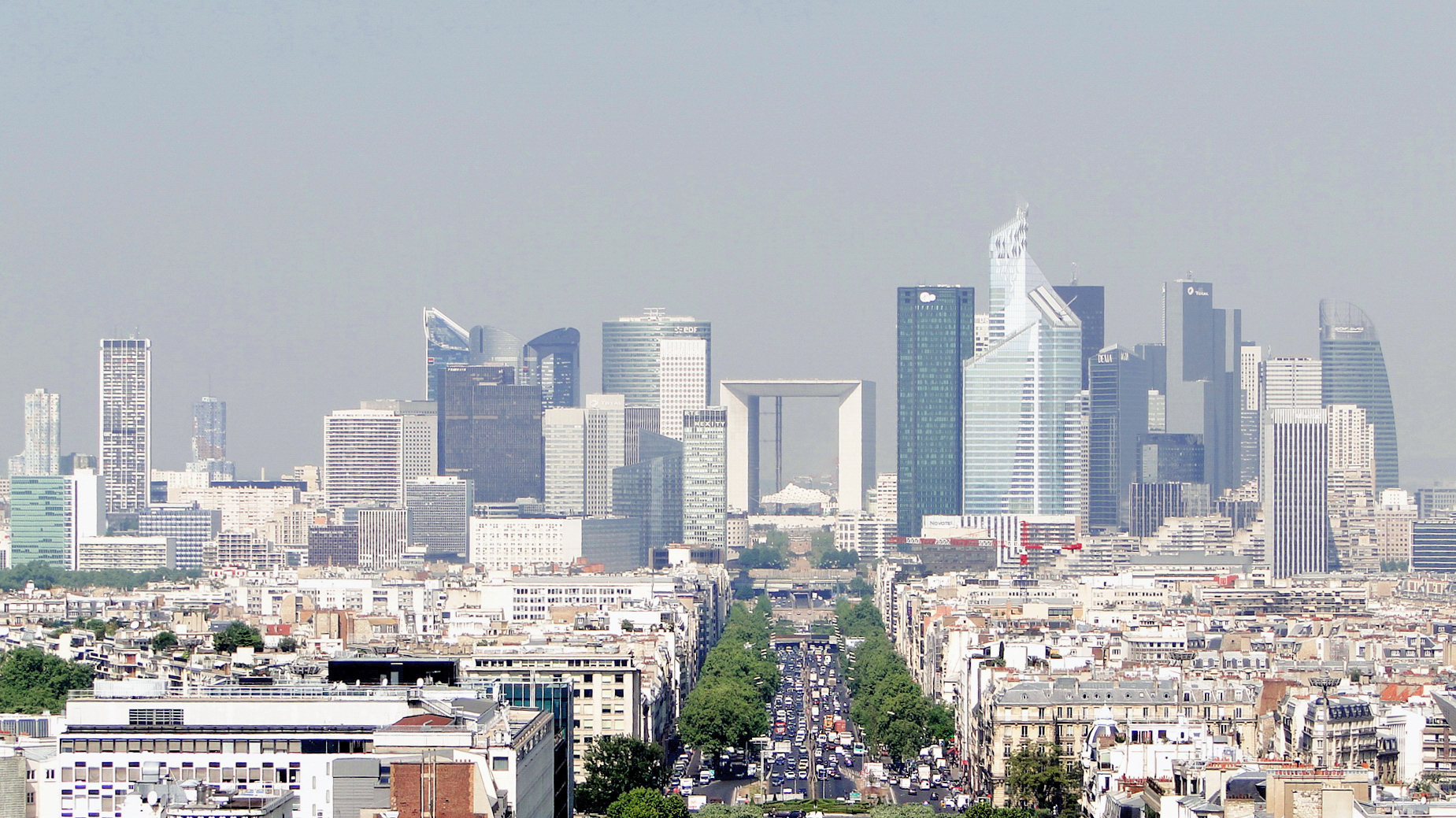 Grande arche NANTERRE